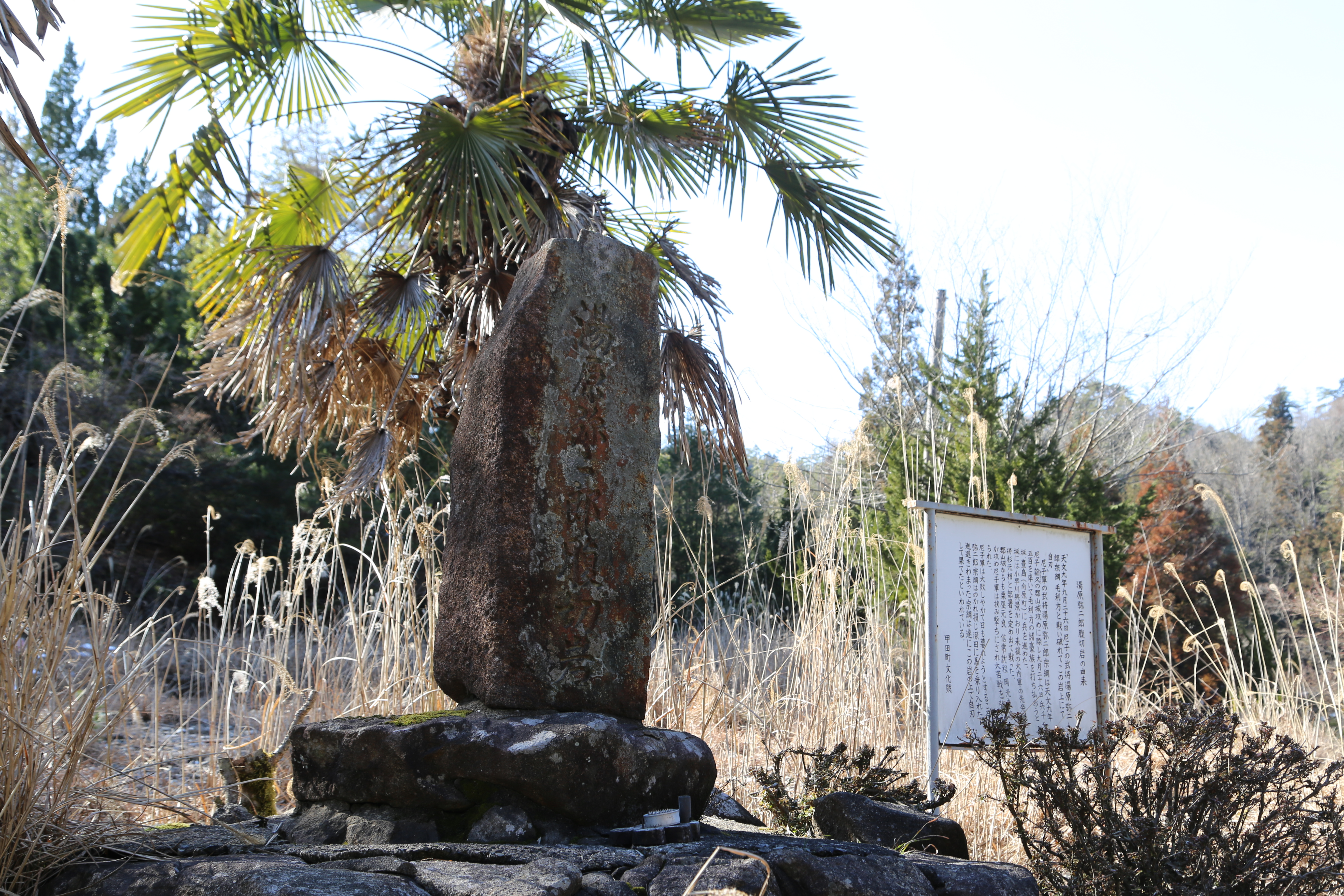 湯原弥二郎宗綱腹切岩